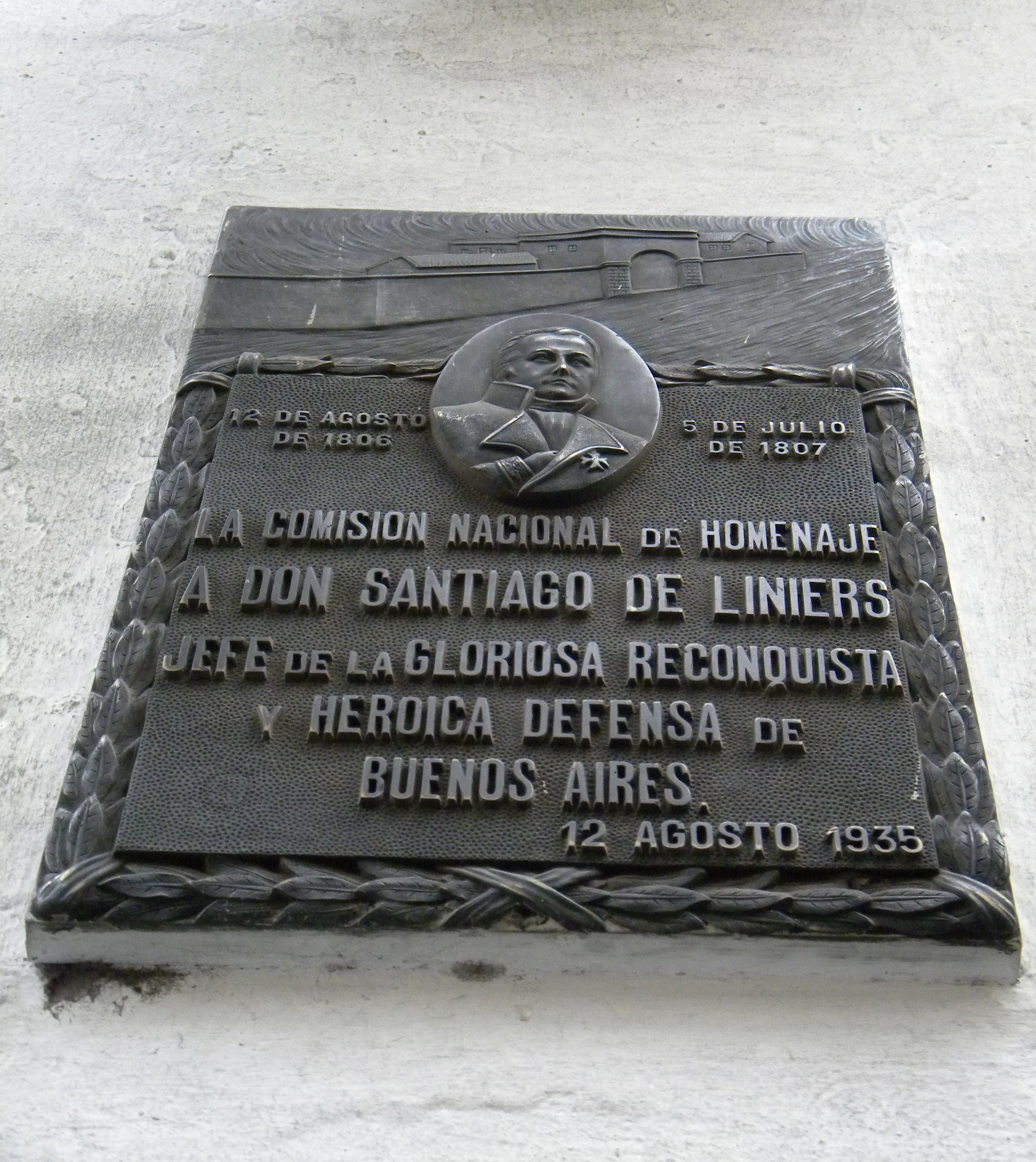 Placa conmemorativa de Santiago de Liniers.